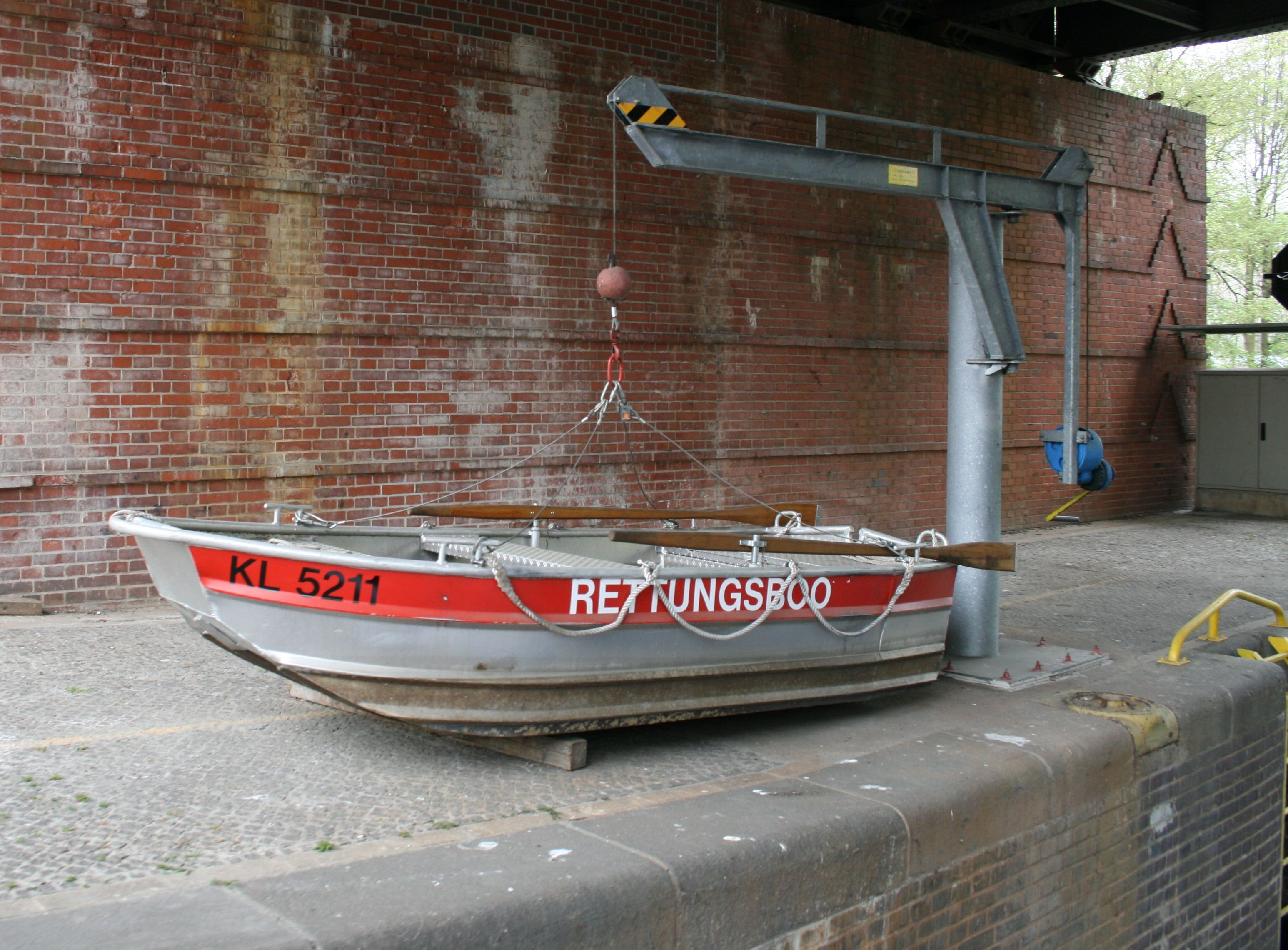 Rettungsboot zum Einsatz an einer Kanalschleuse, Berlin